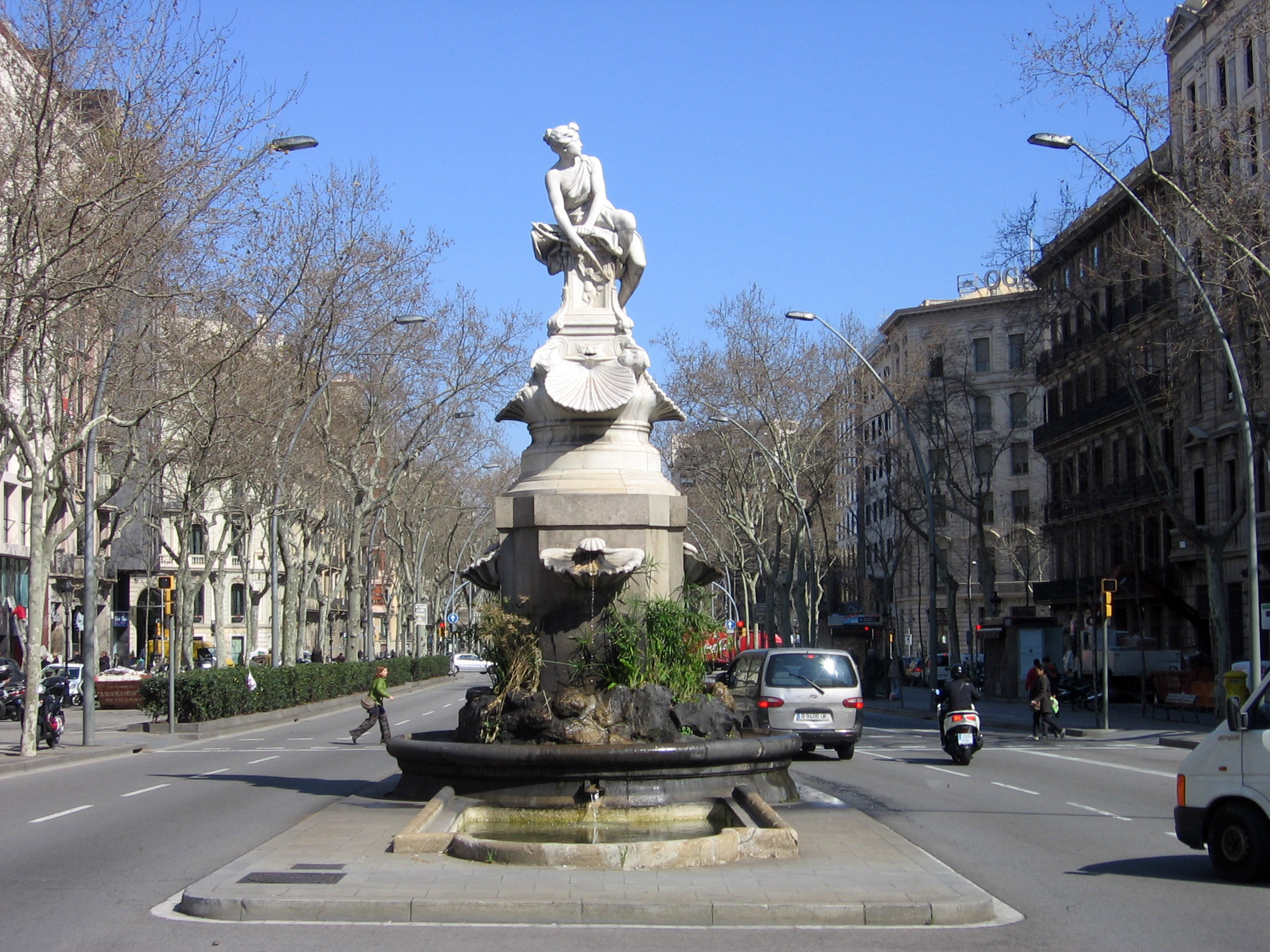 Fuente de Diana, Venanci Vallmitjana.